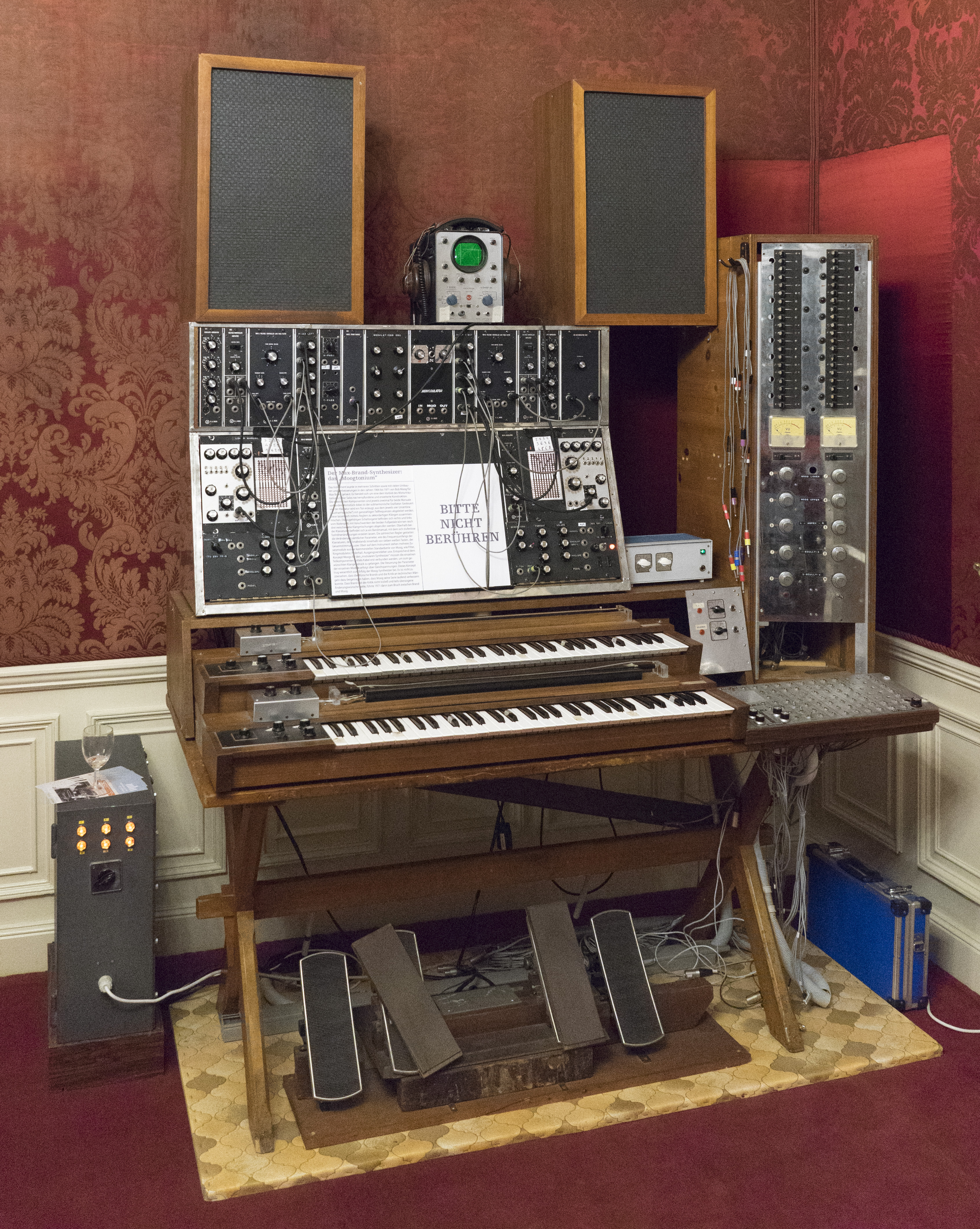 Miethaus